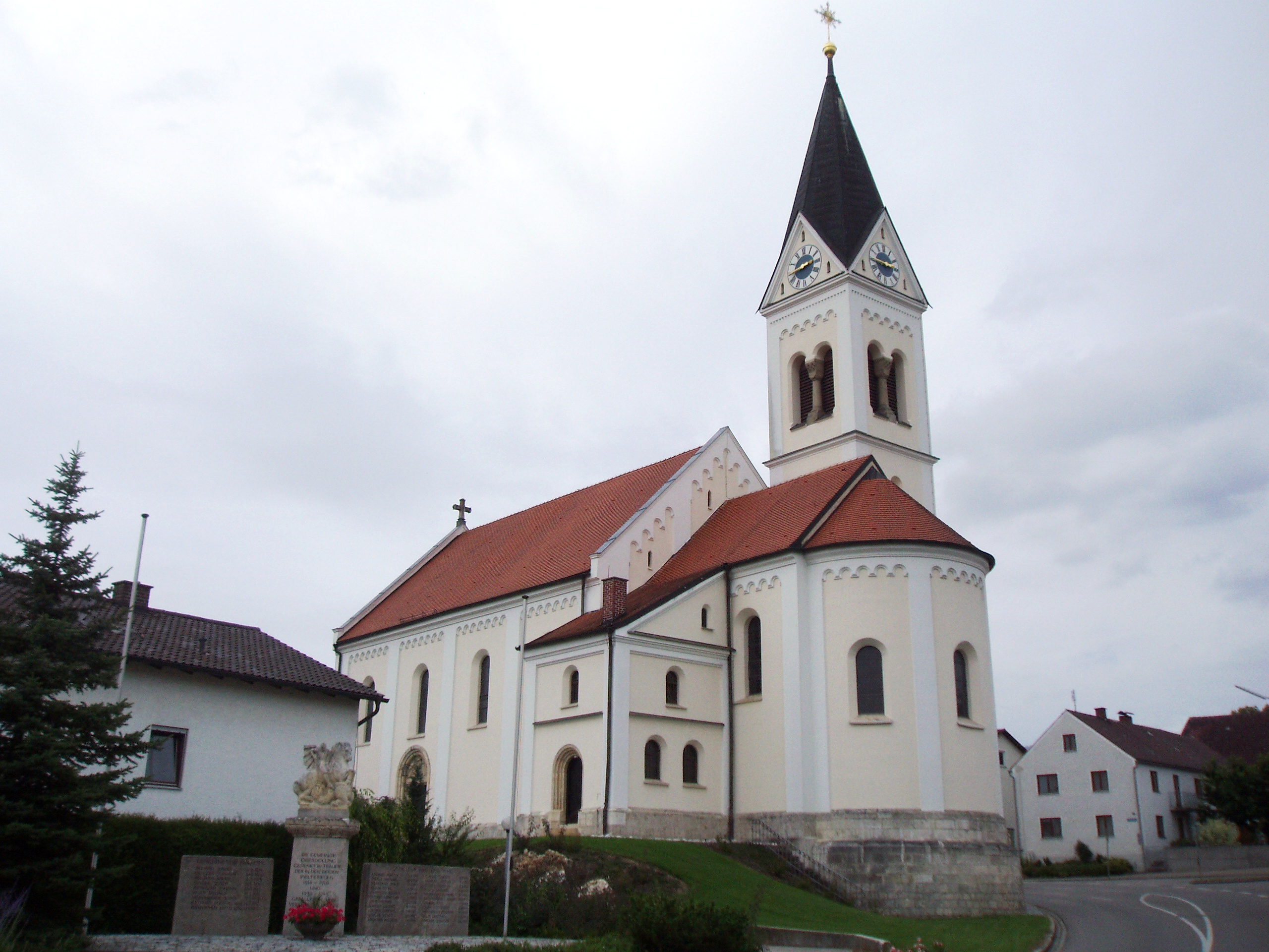 Oberdolling,_katholische_Pfarrkirche_St._Georg,_Außenansicht